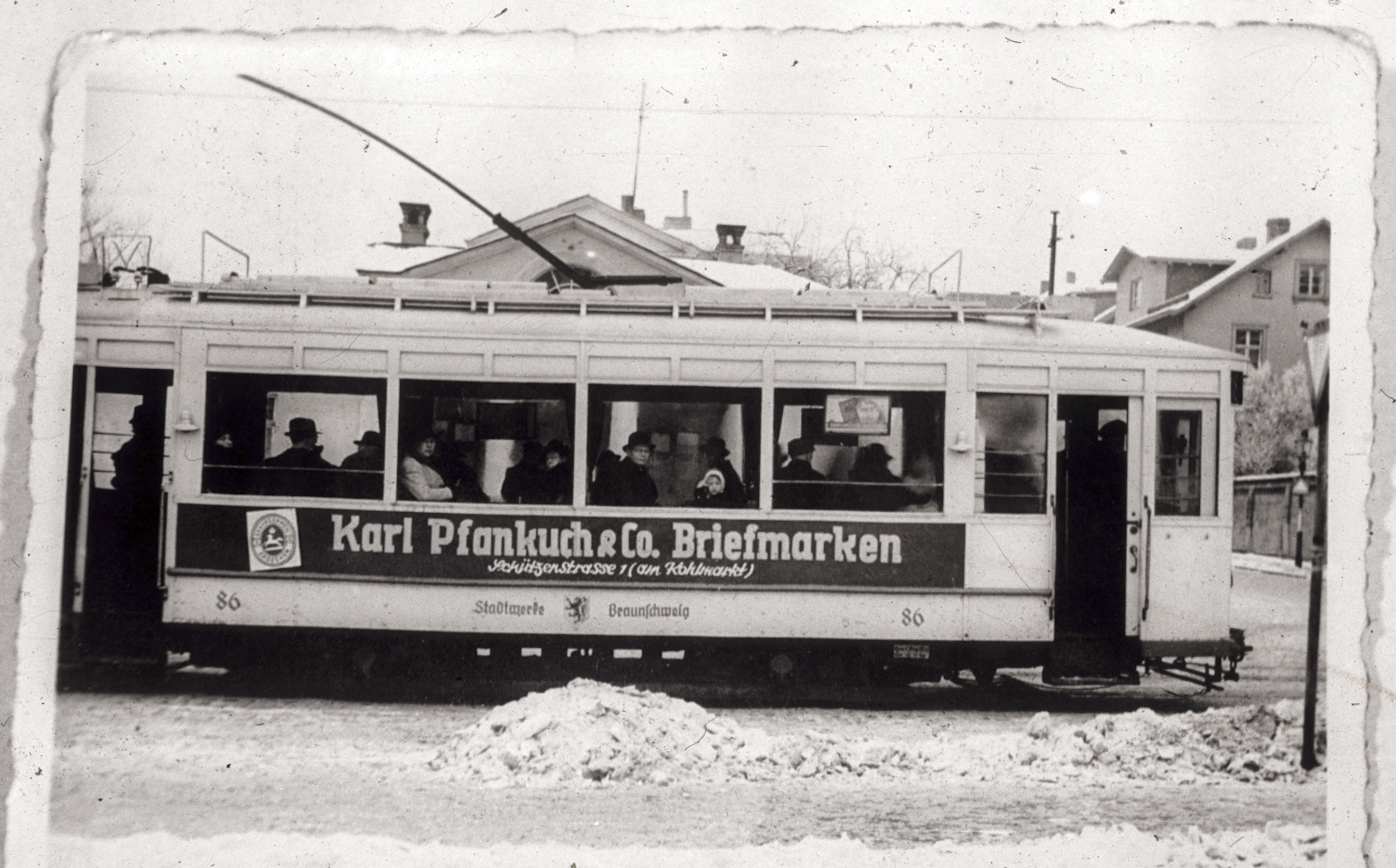 Straßenbahn in Braunschweig 50er Jahre mit Werbung Pfankuch Briefmarken